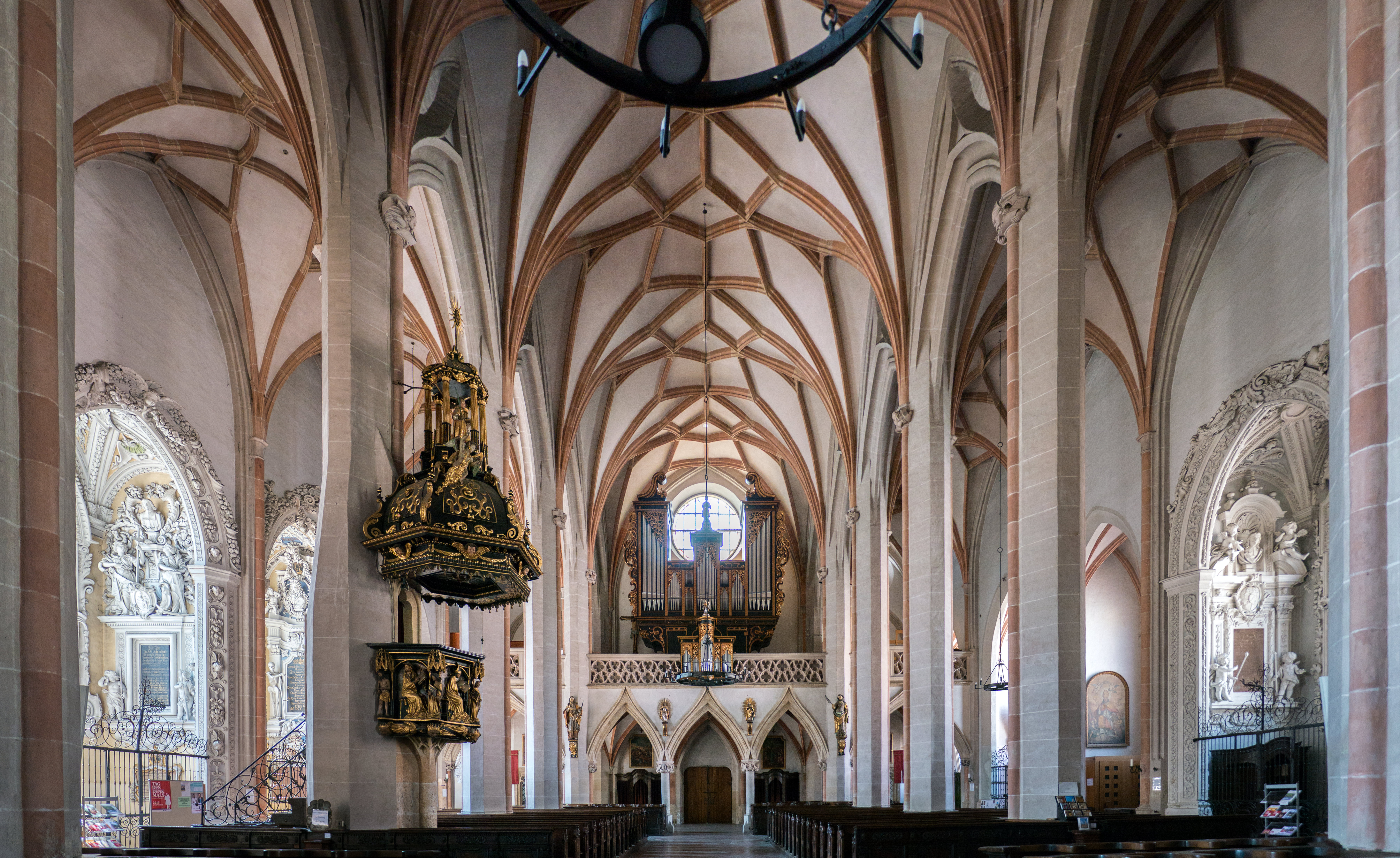 Stadtpfarrkirche hl. Stephanus